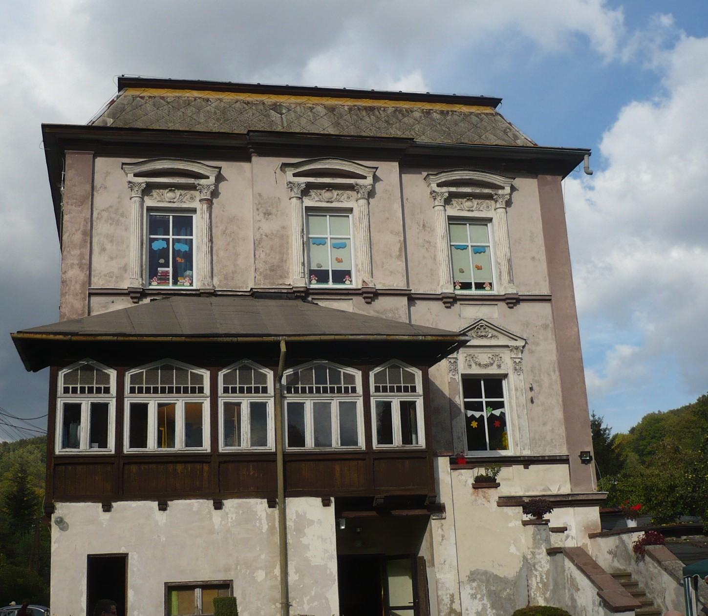 Włodowice, nr 50